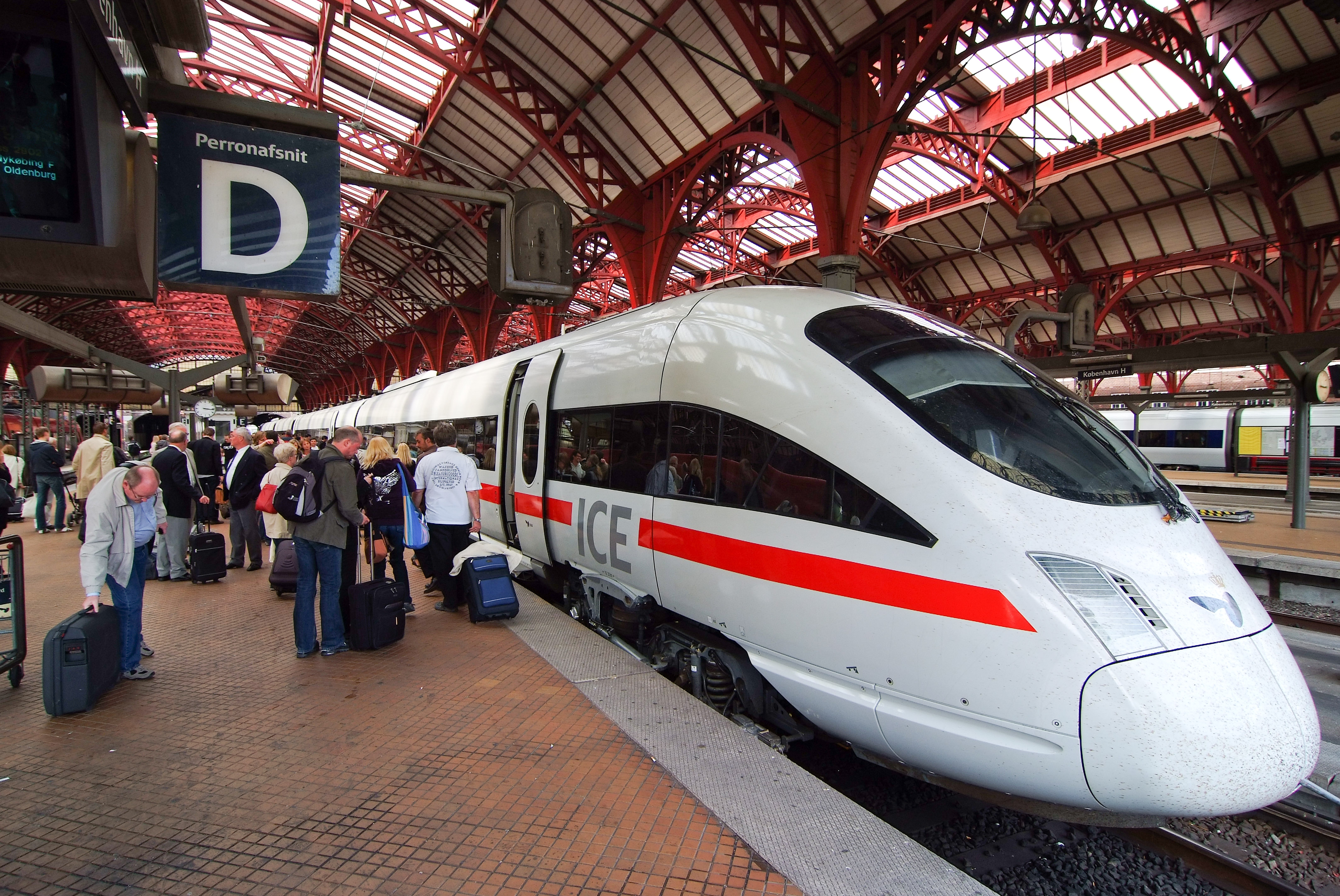 ICE TD in Copenhagen (Københavns Hovedbanegård)